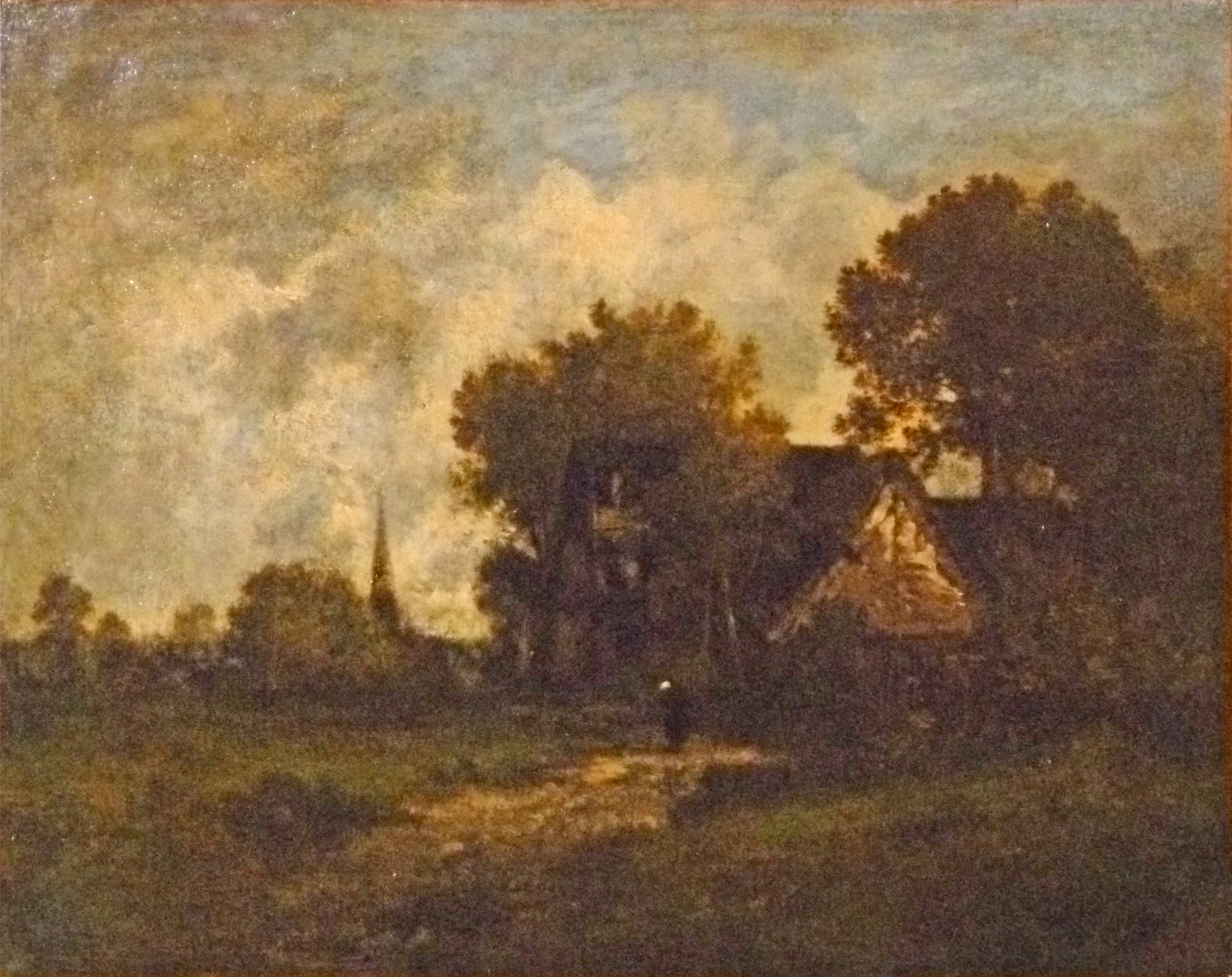 "Landschap met hoevetje", olieverf op doek (41 x 53 cm) door de Franse kunstschilder Léon Richet (1847-1907); privébezit